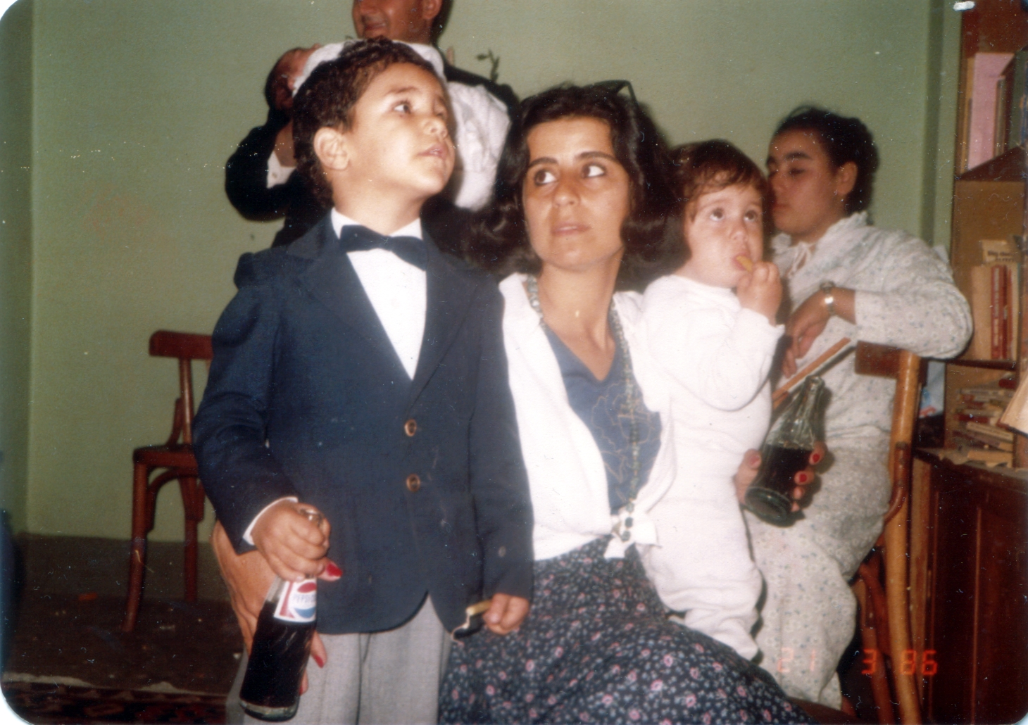 Alaa and taunty dahdaf